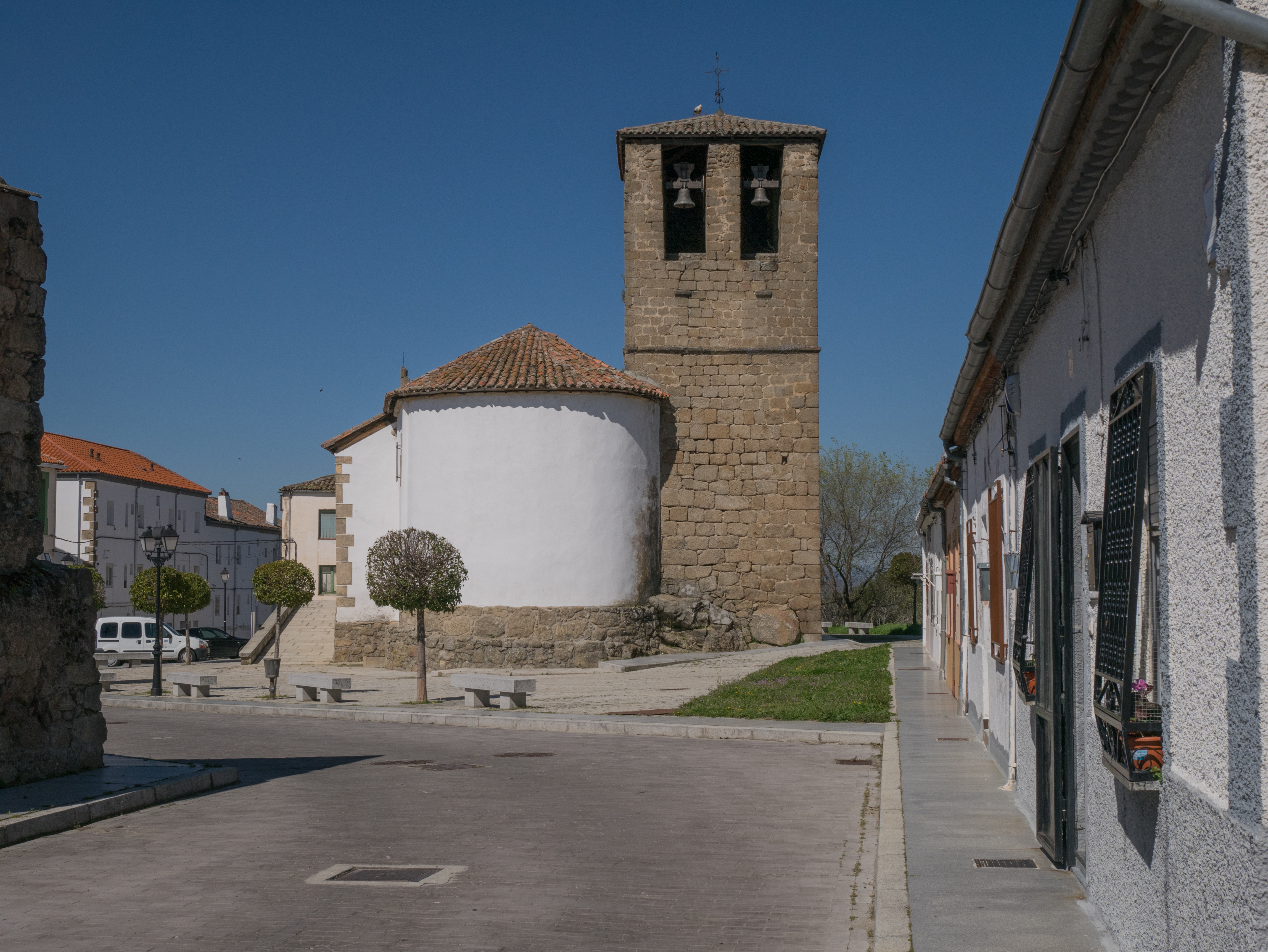 Iglesia de Santiago en Béjar. Salamanca, Castilla-León, España